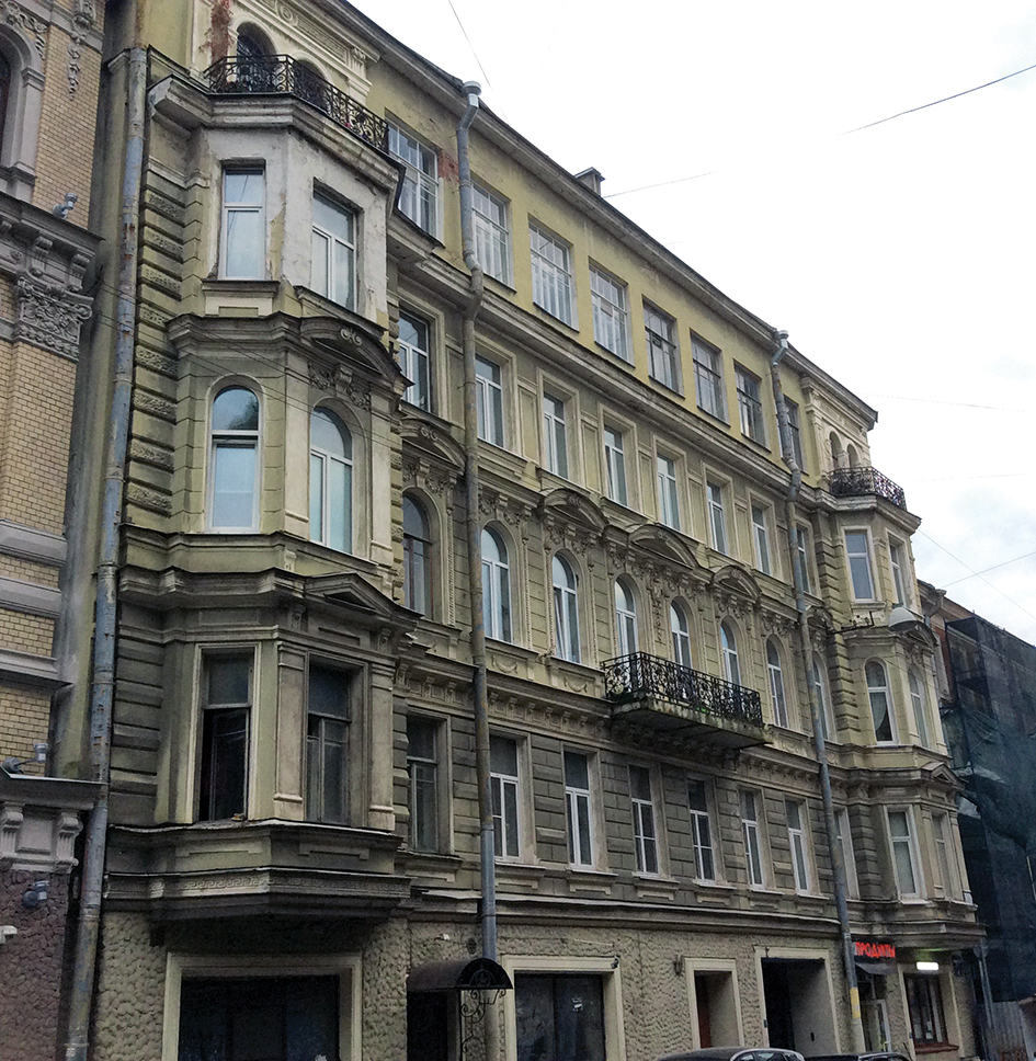 Доходный дом по Галерной ул., 42. Архитектор Мельников Николай Алексеевич. Год постройки – 1902.